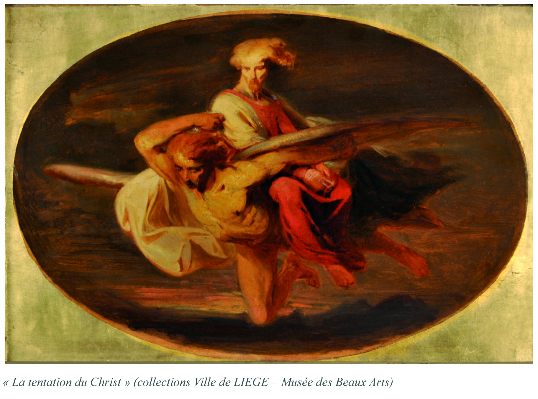 Peinture réalisée par Paul-Joseph Carpay (20x30cm) présentée au Salon de Bruxelles de 1848 (musée des Beaux-Arts de Liège)